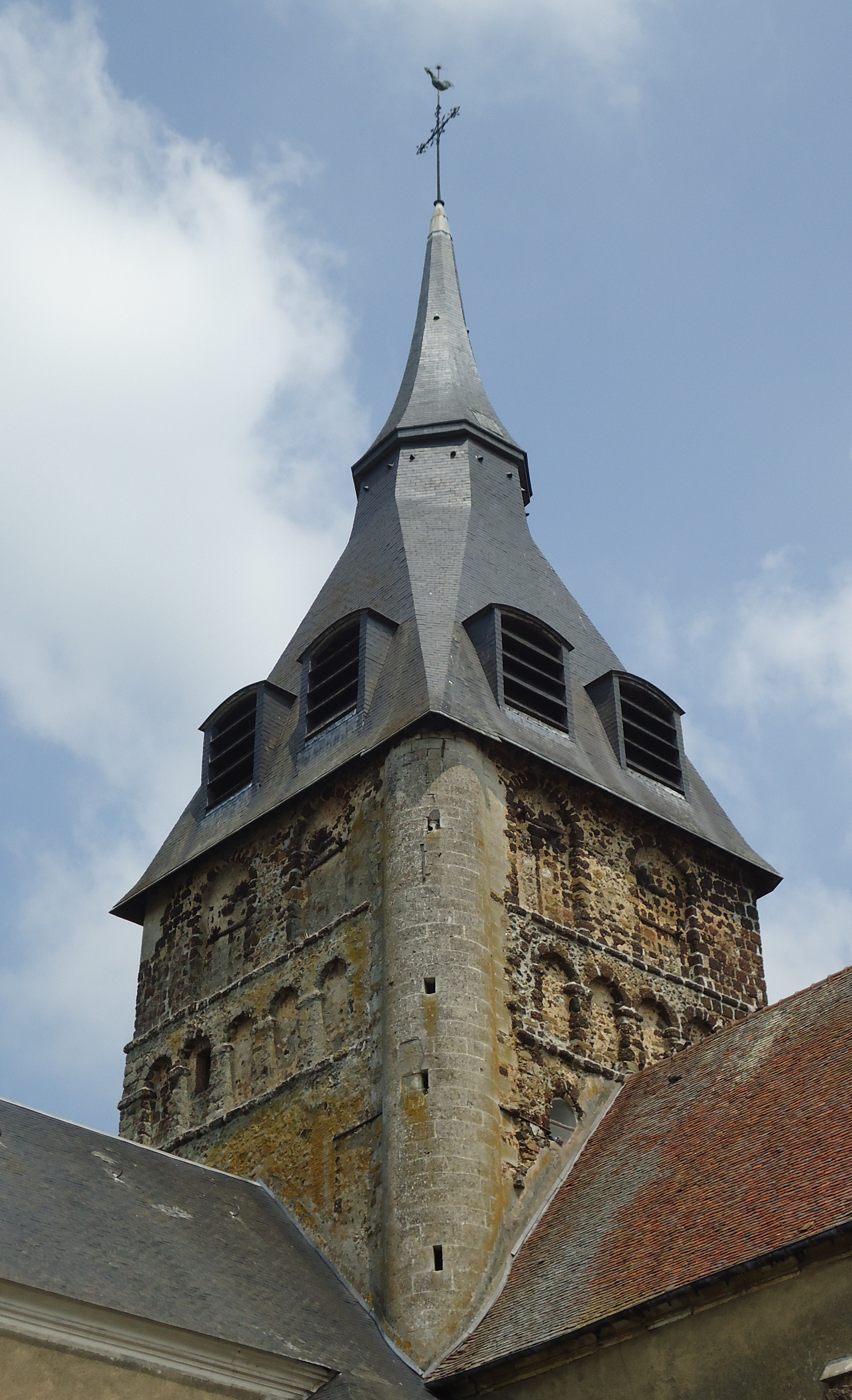 Eglise Saint-Sulpice, XIe & XIIe (ISMH) - Breteuil (27) - France